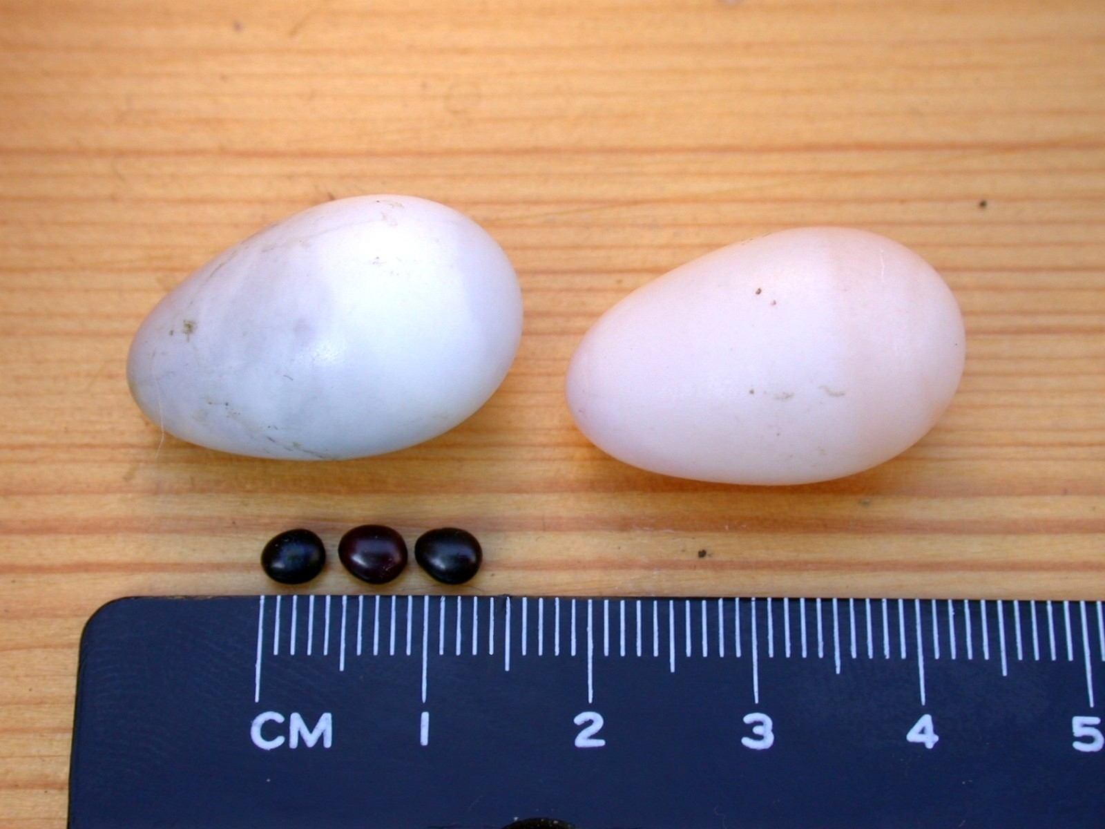 Eier des Mauerseglers und Puppen der Mauerseglerlausfliege, inkl. Maßstab